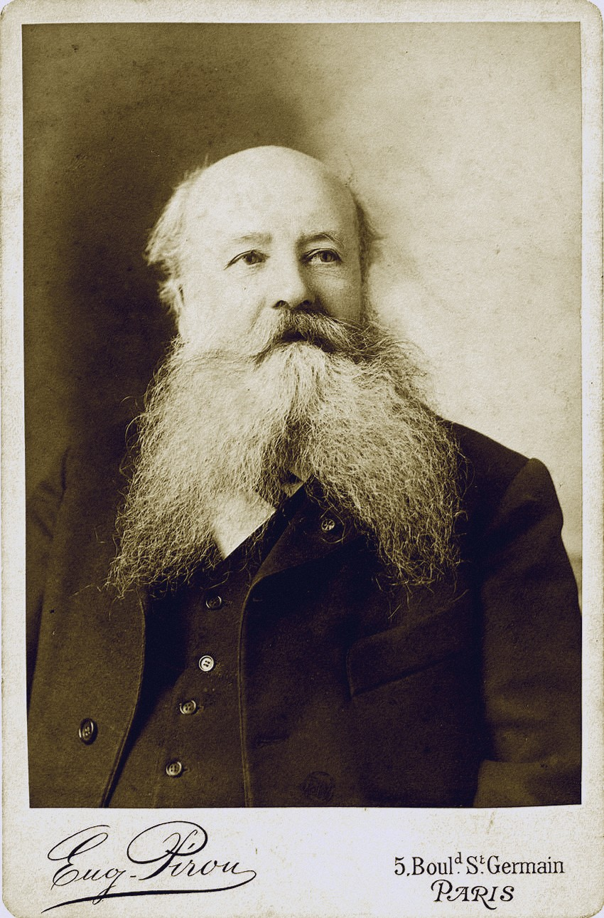 Autoportrait d'Eugène Pirou, format cabinet sur carton de l'atelier. Entre 1903 et 1909. Bibliothèque nationale de France.